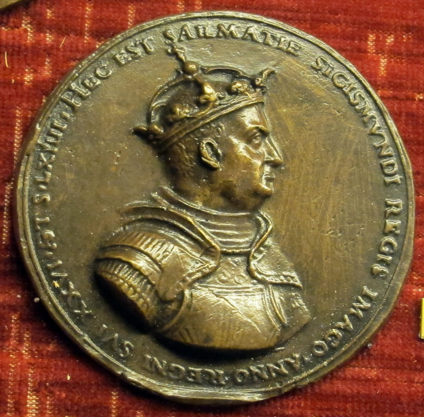 Medaglia di Sigismondo I di Polonia (1467-1548)